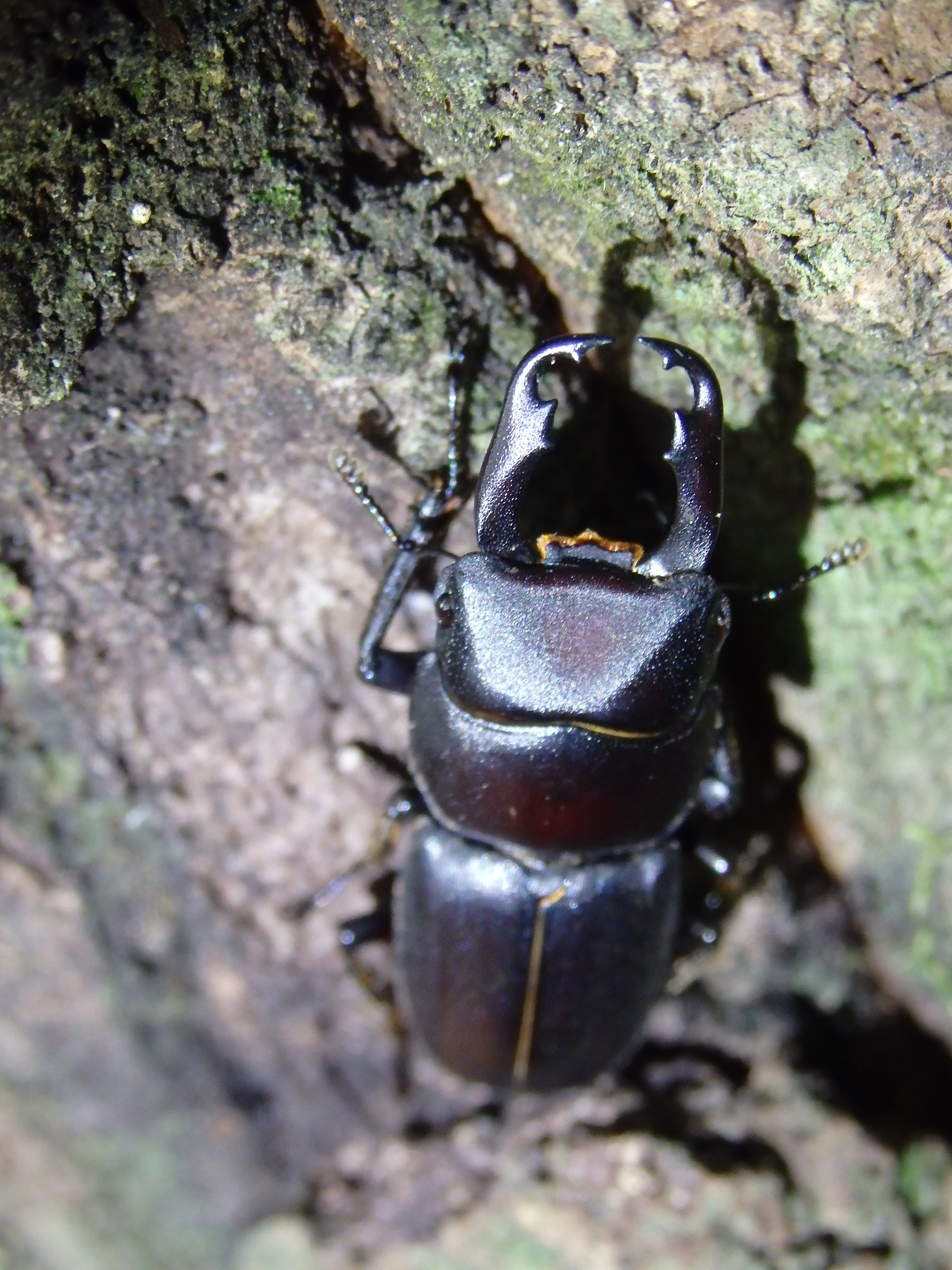 スジクワガタ♂ 大アゴの内歯に特徴がある